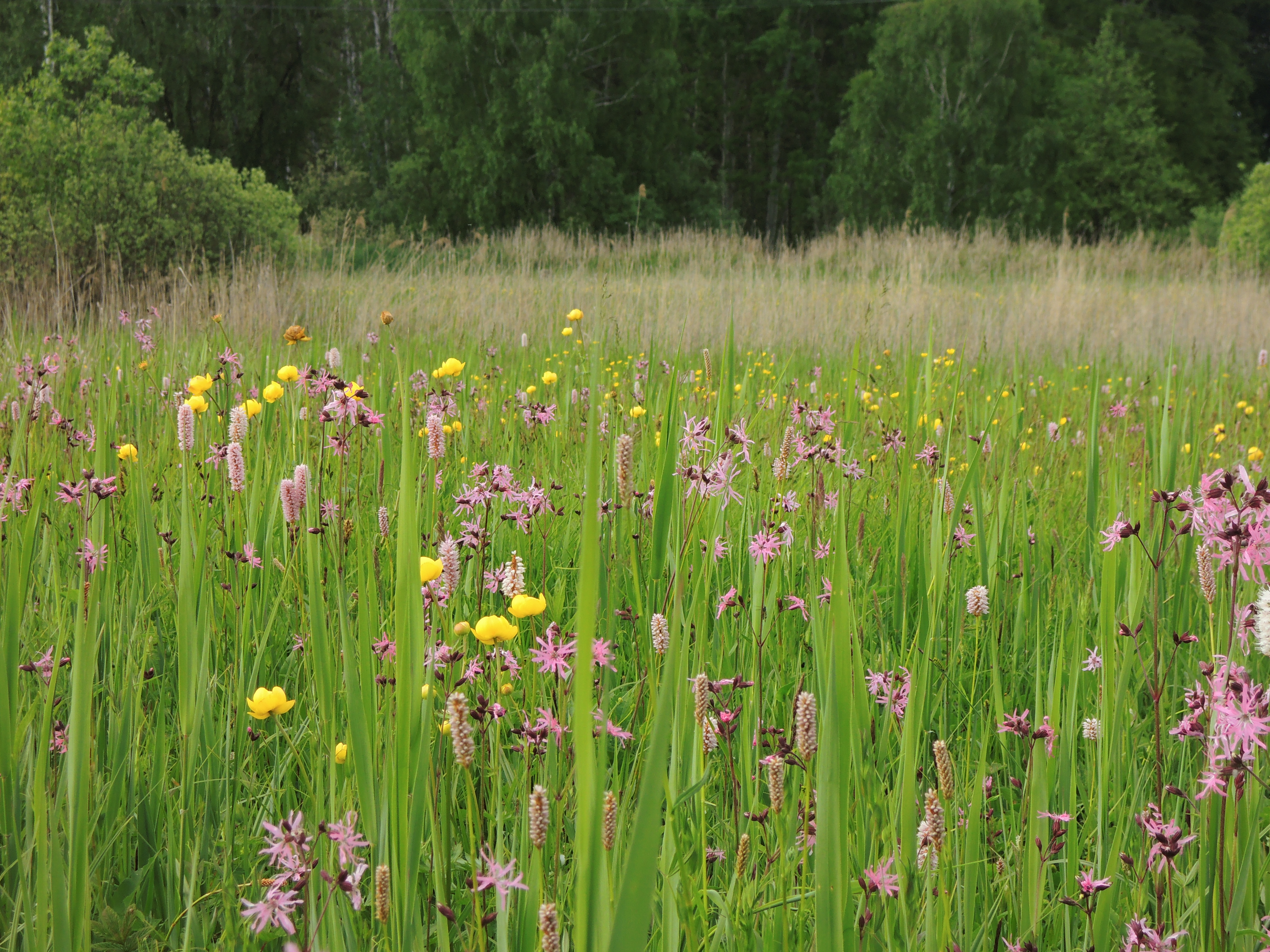 PR Červená louka